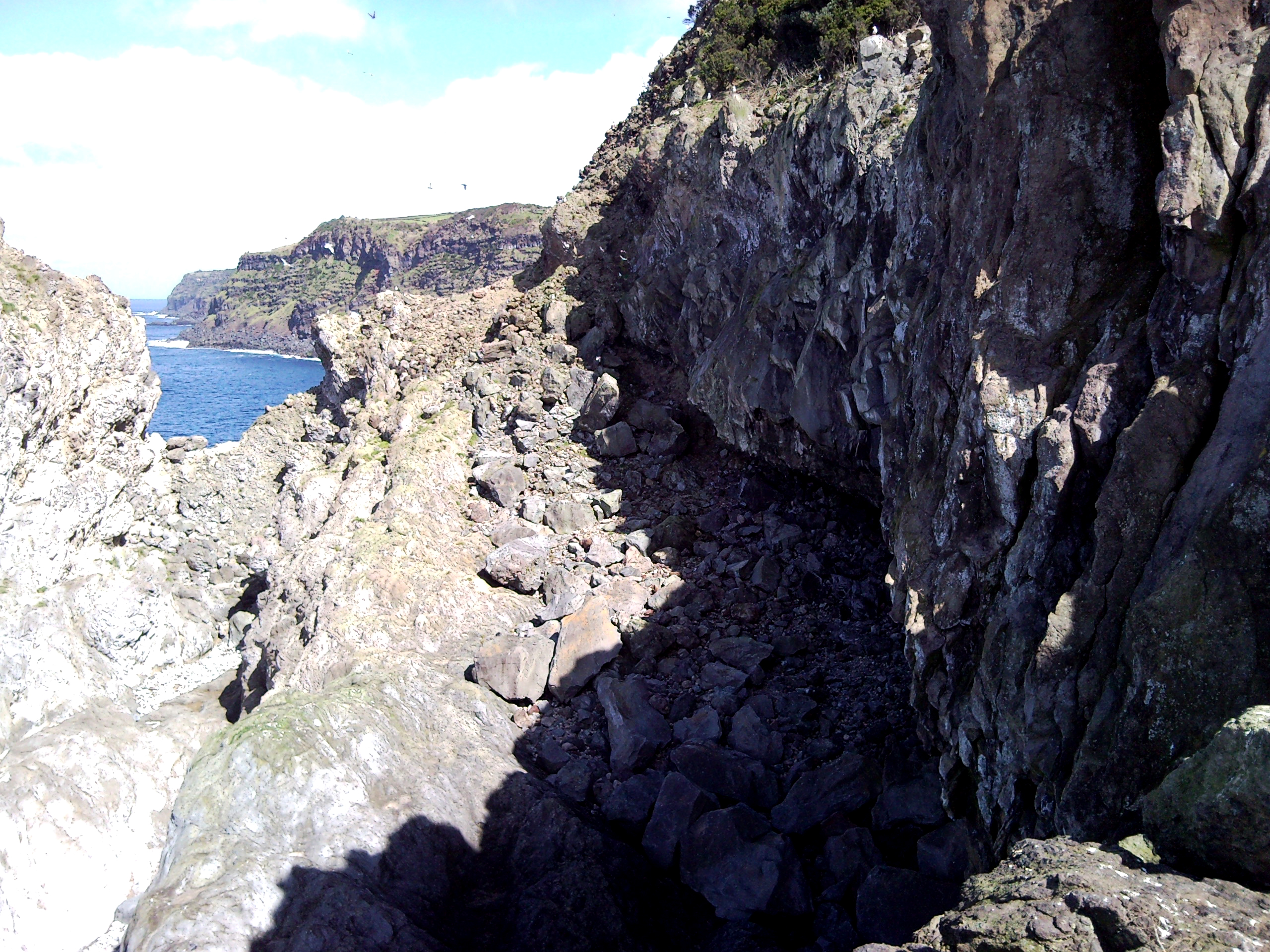 Serra de Santa Bárbara e Pico Alto, Ponta da Serreta falesias rochosas, ilha Terceira, Açores